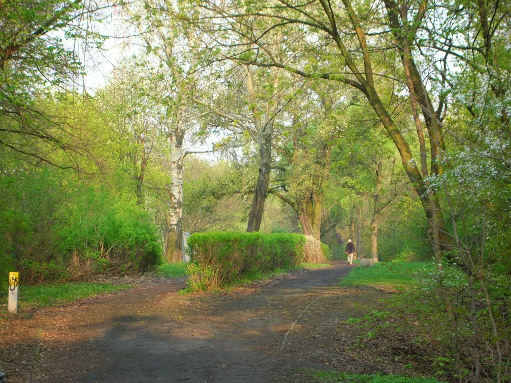 Park Wzgórze Wolności w Bydgoszczy